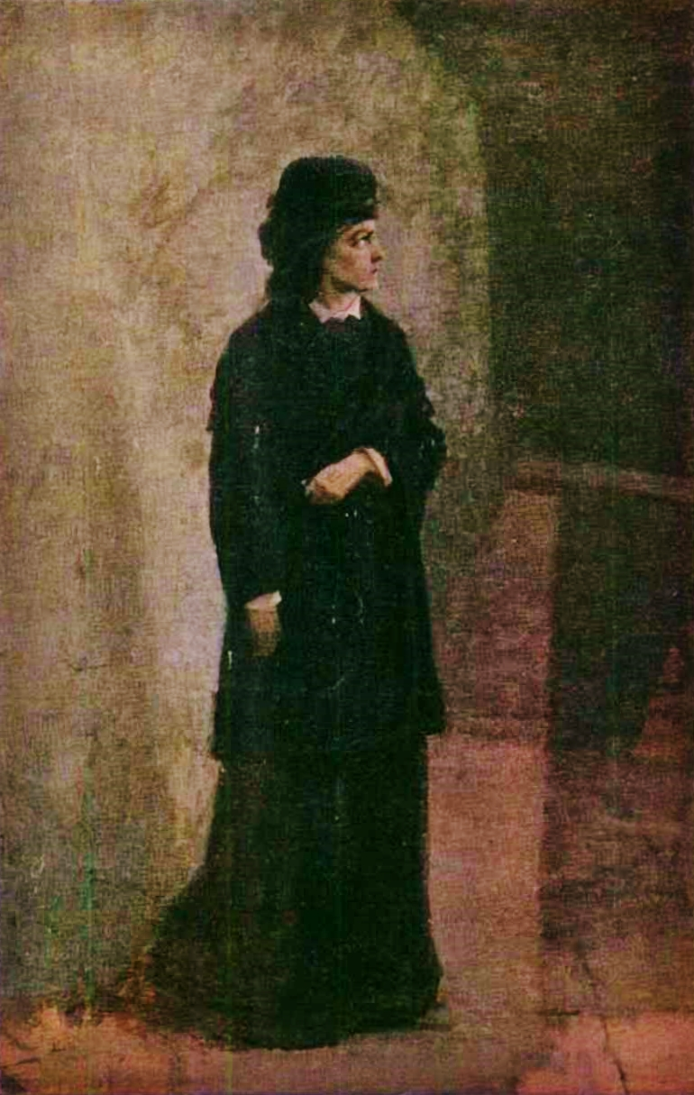 La Terrorista